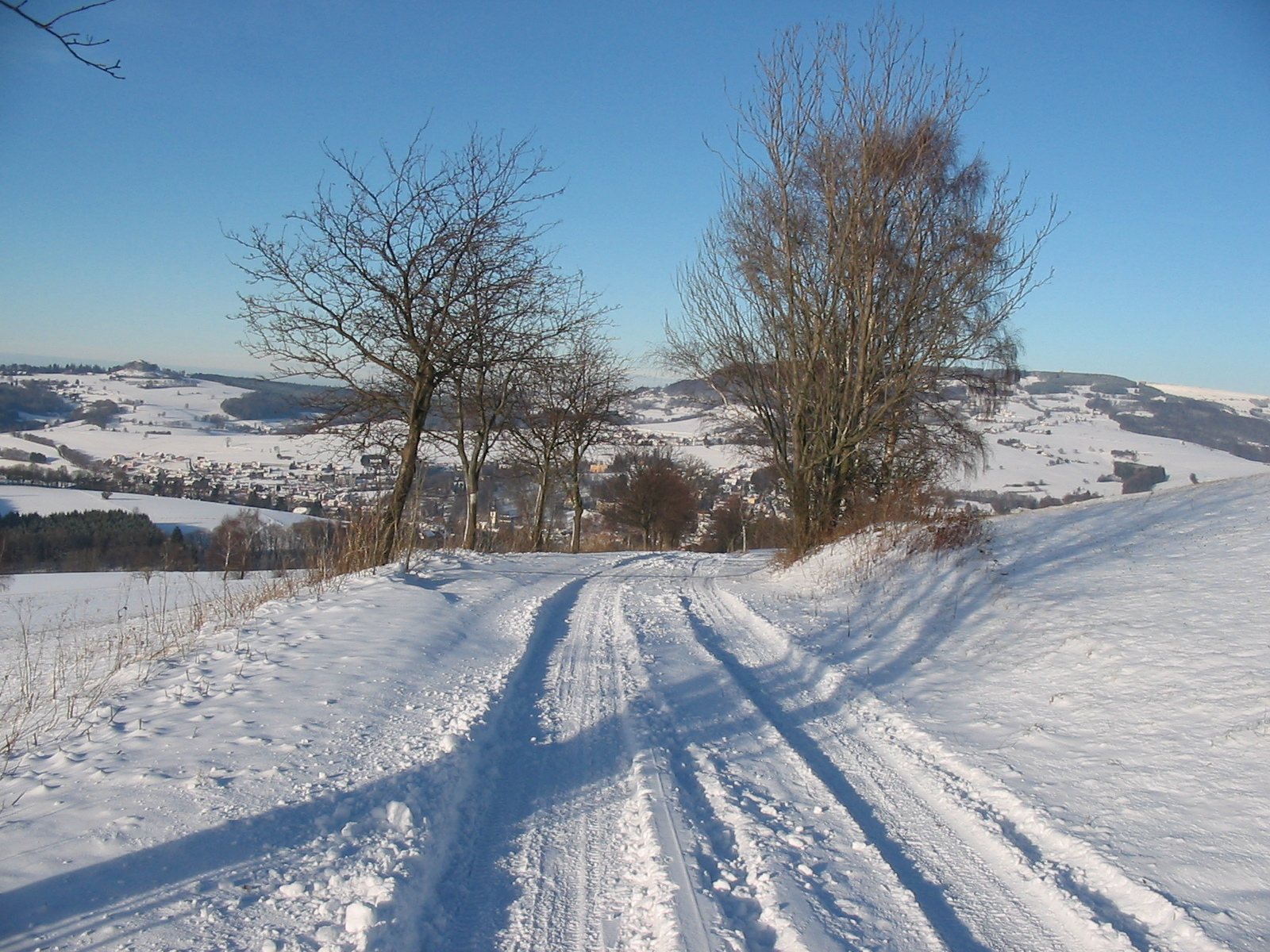 Rhön - Blick auf Gersfeld